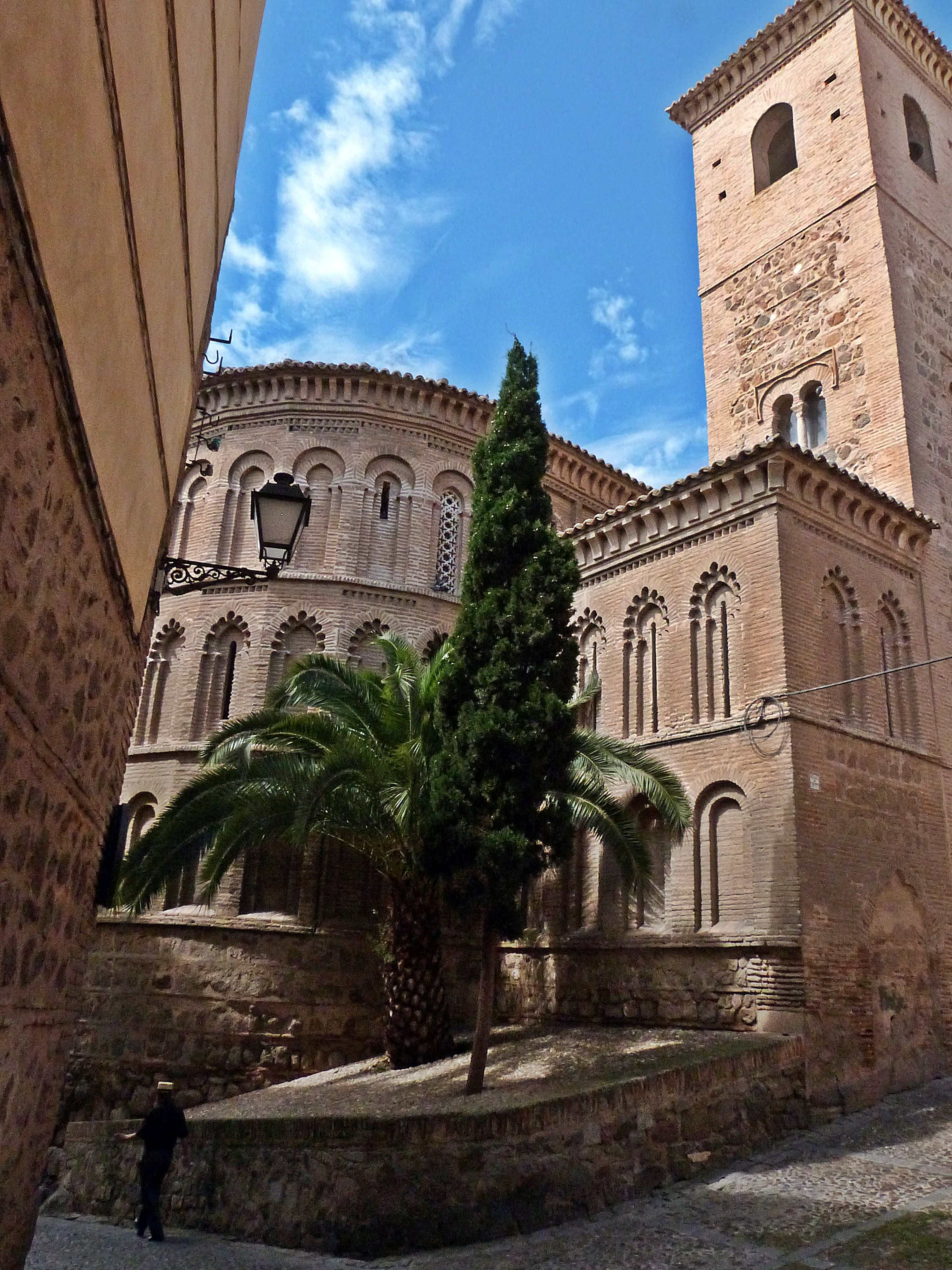 San Bartolomé in Toledo